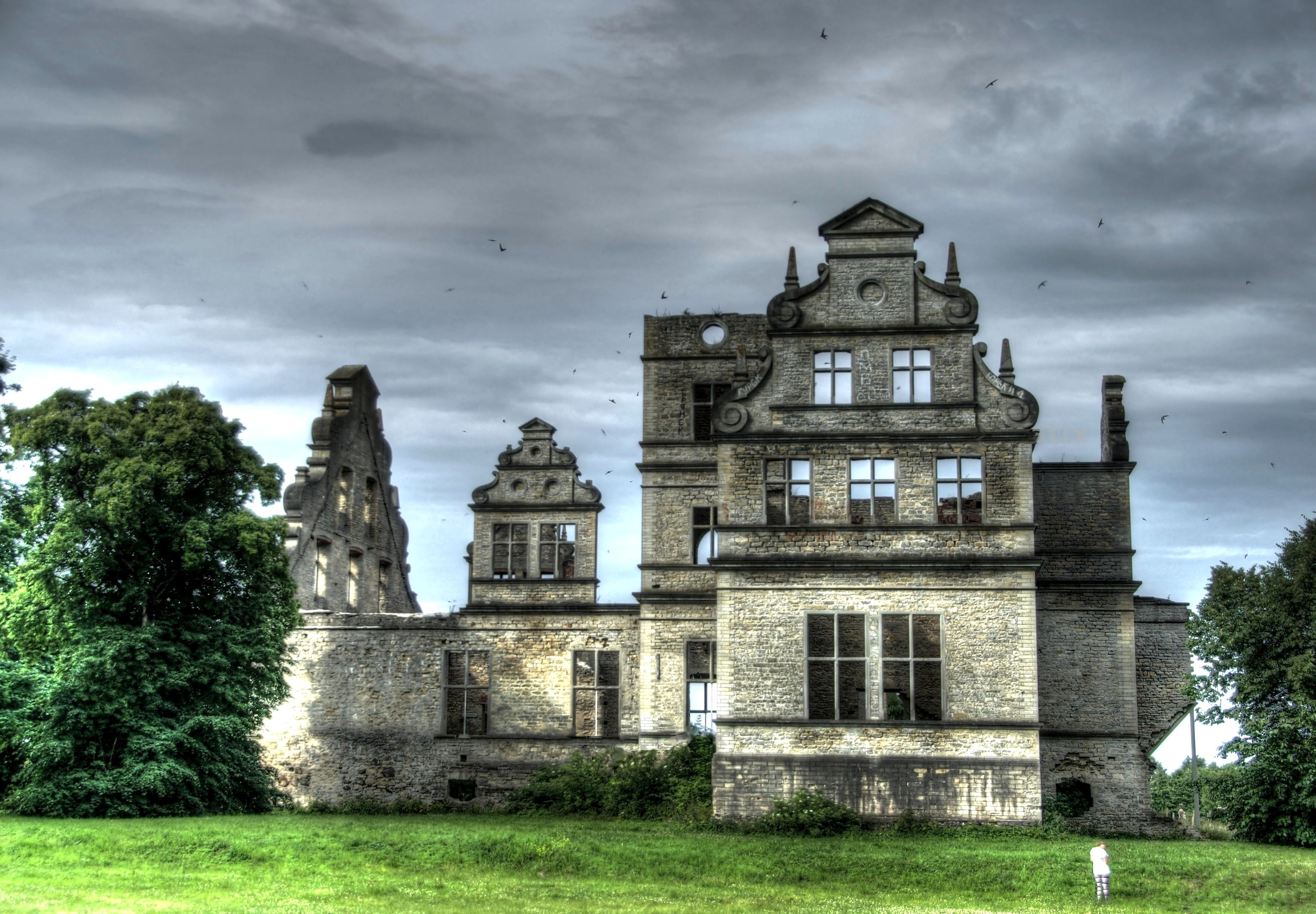 Ungru mõisa peahoone varemed